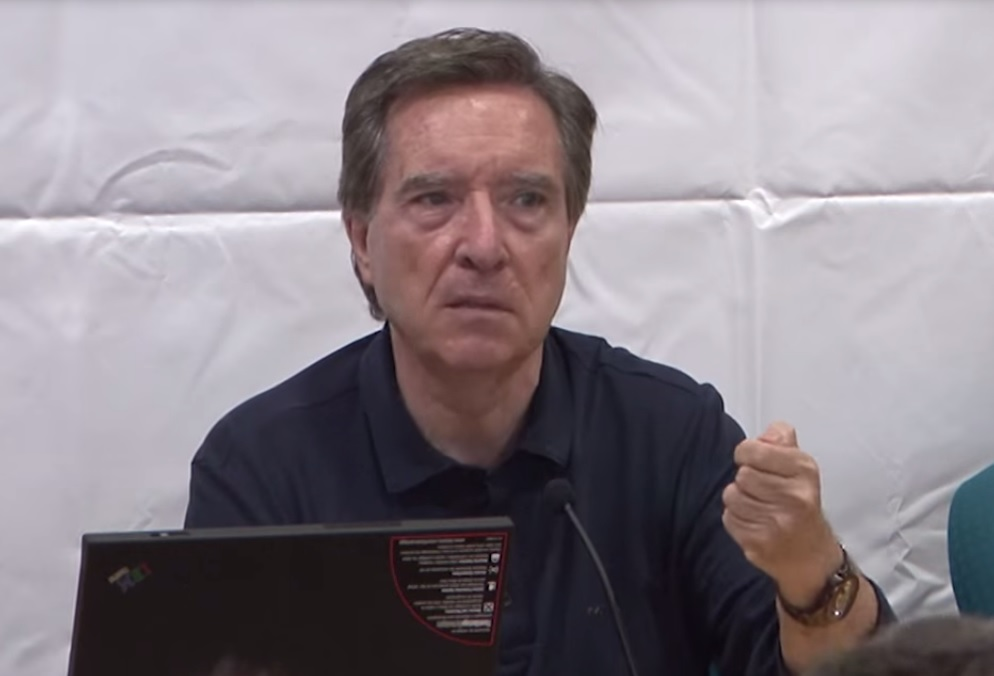 Iñaki Gabilondo, 2015.